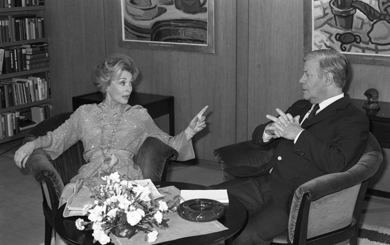 Fernsehinterview des Bundeskanzlers mit Lilli Palmer